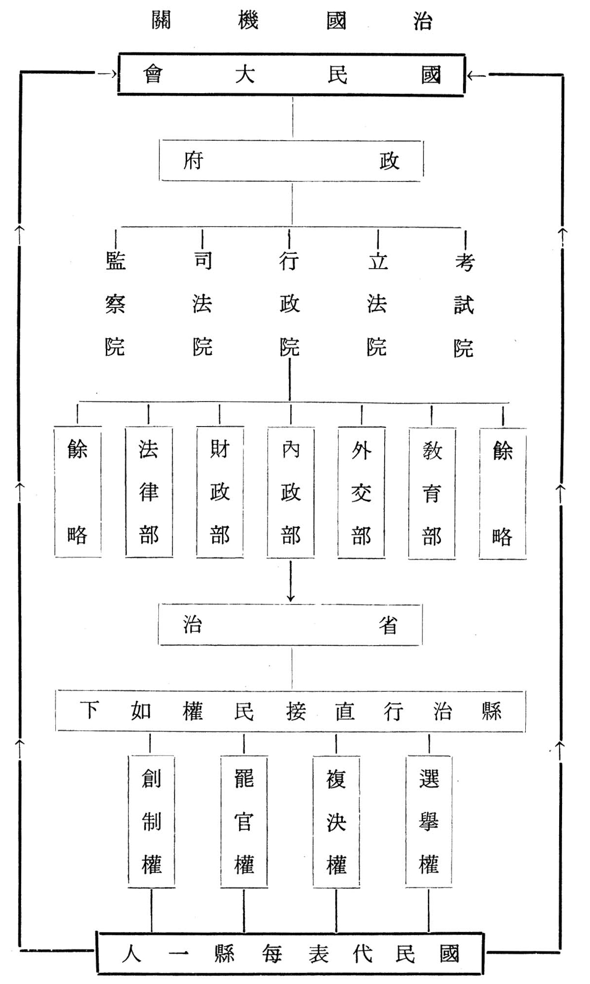 孫中山在五權憲法演講上手繪之治國機關圖